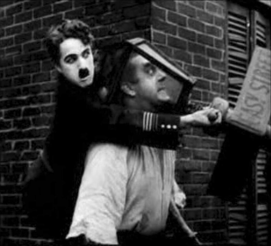 Fotografía de Charlie Chaplin en Easy Street (1917).